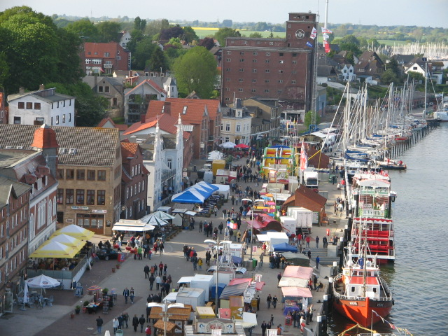 Kappelner Heringstage im Sommer 2006